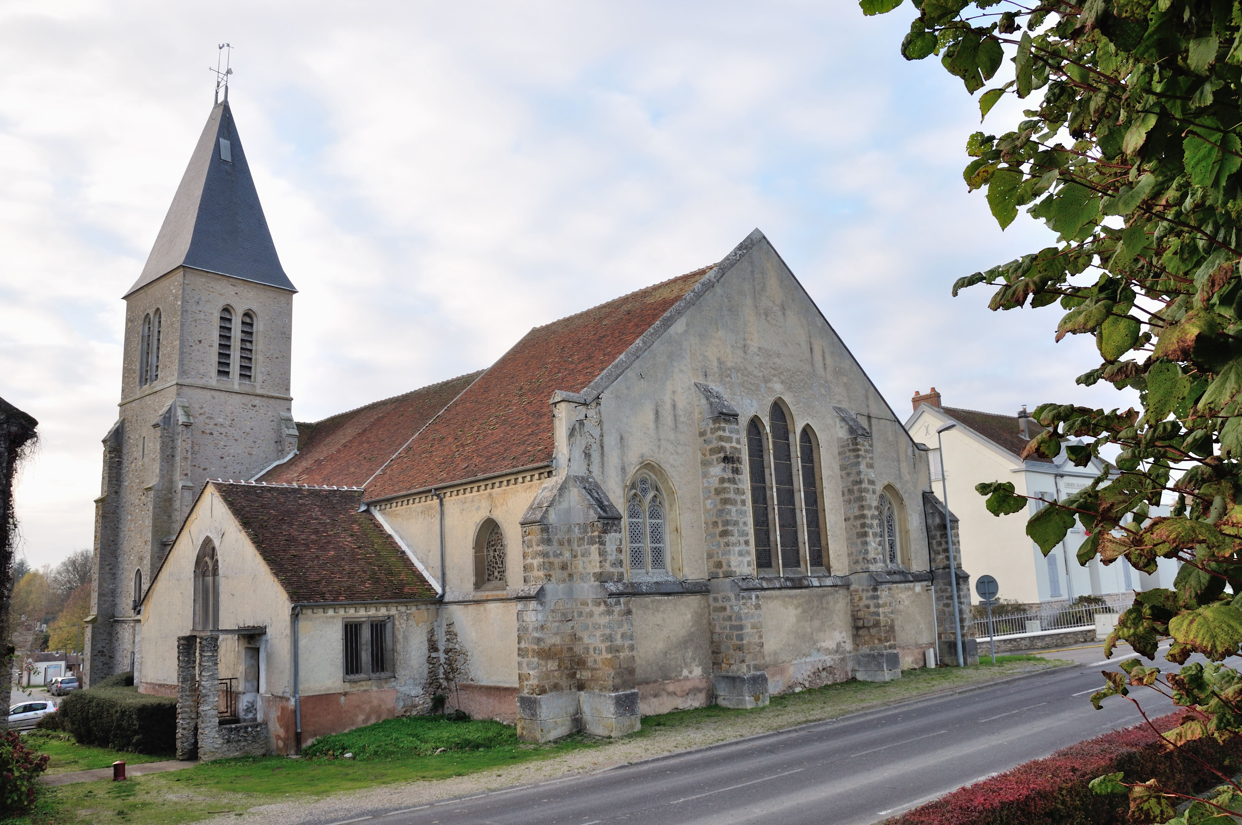 Église Saint-Sulpice de Maisoncelles-en-Brie. (département de la Seine-et-Marne, région Île-de-France).